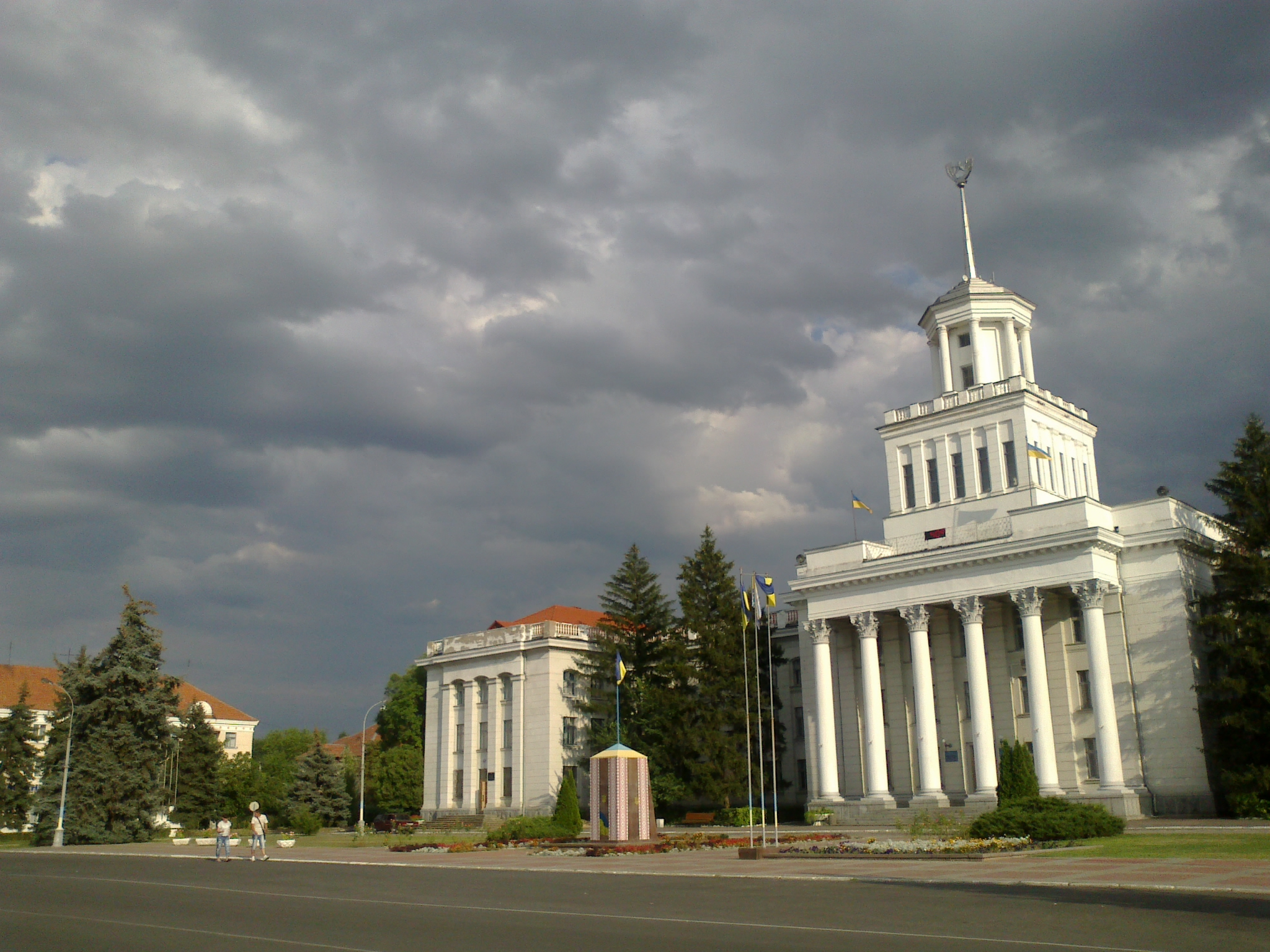 Мерія міста Нова Каховка